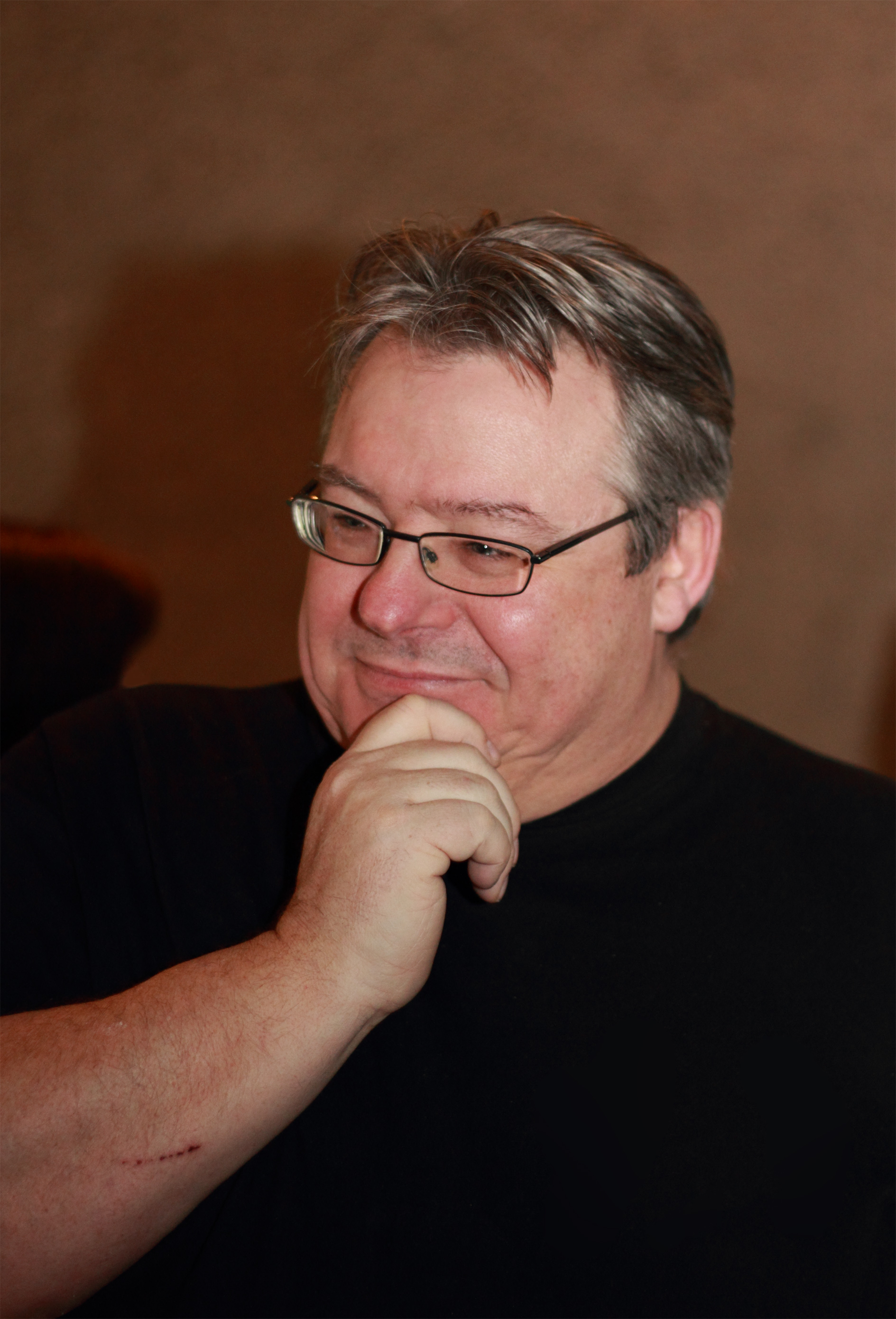 Verleihung des Schallwelle-Musikpreises am 10. März 2012. Foyer des Planetariums Bochum. Ron Boots.